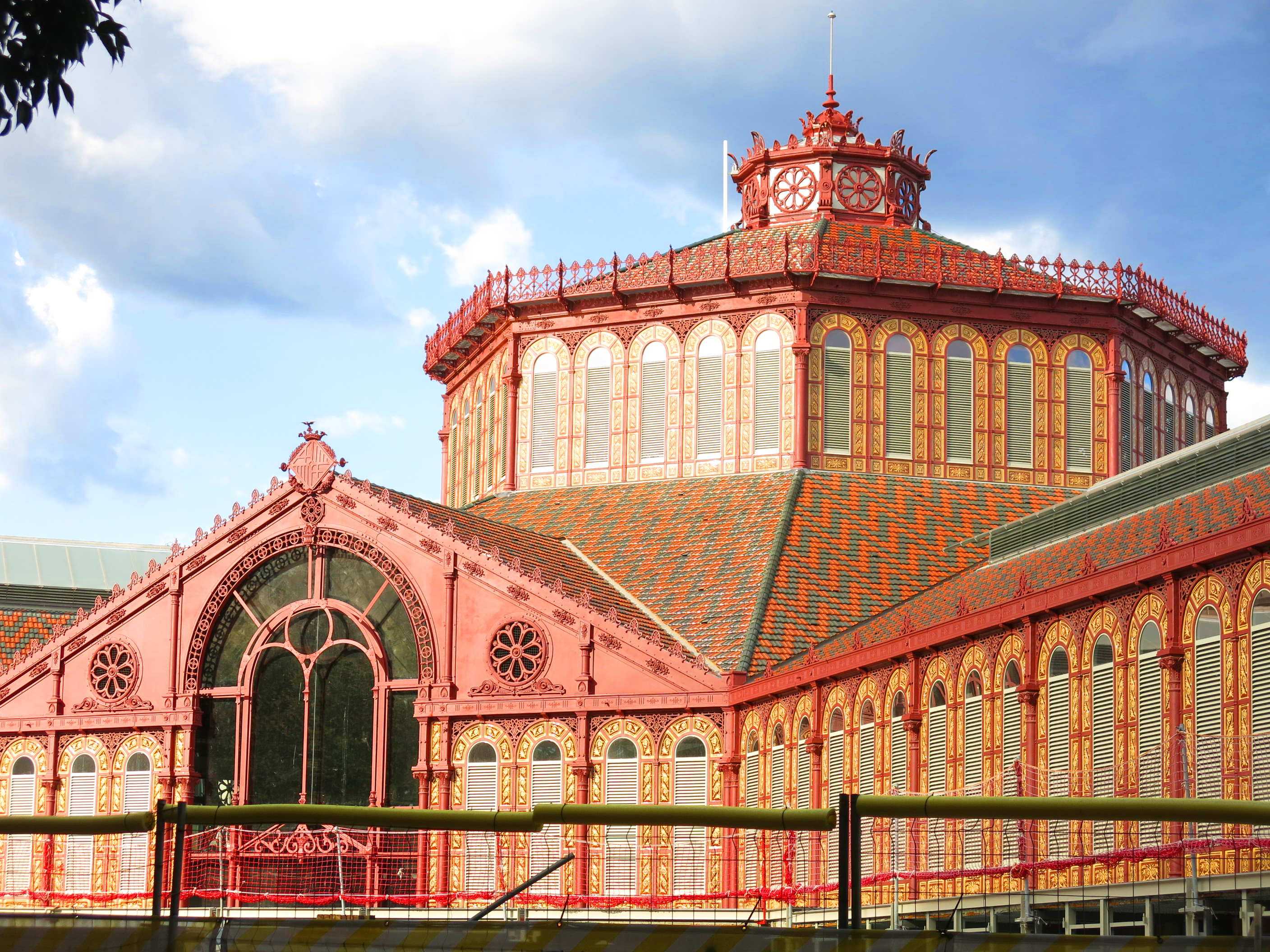 Mercat de Sant Antoni (Barcelona)